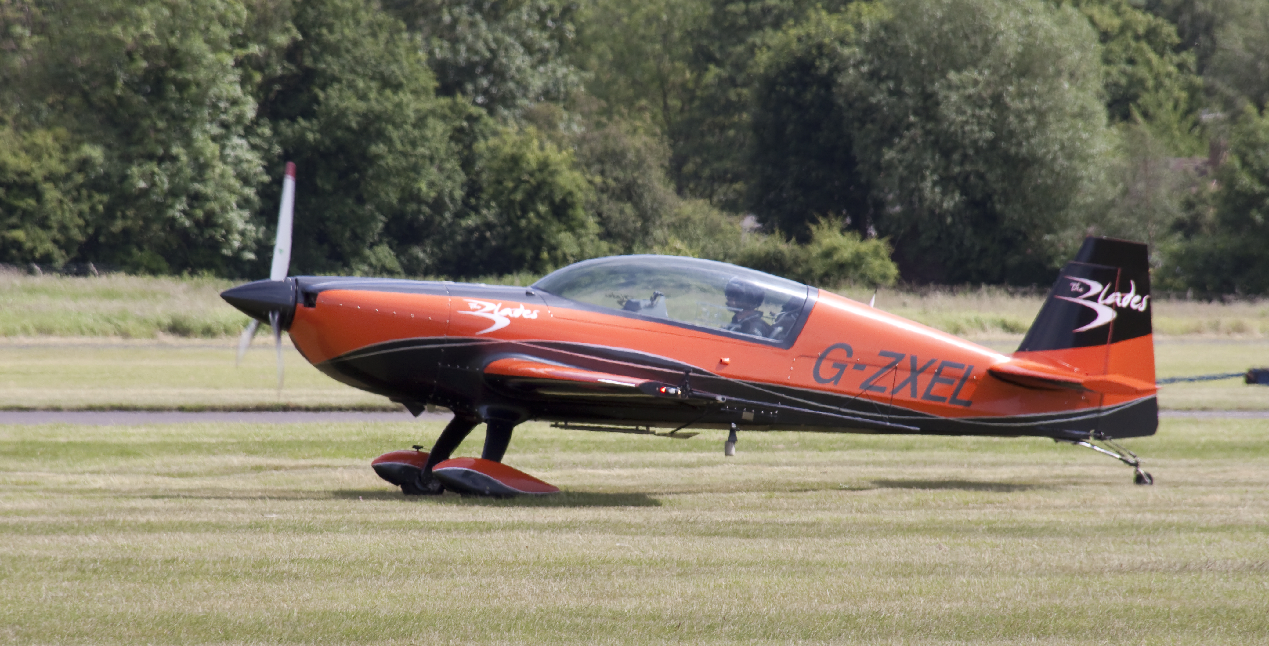 Blades G-ZXEL